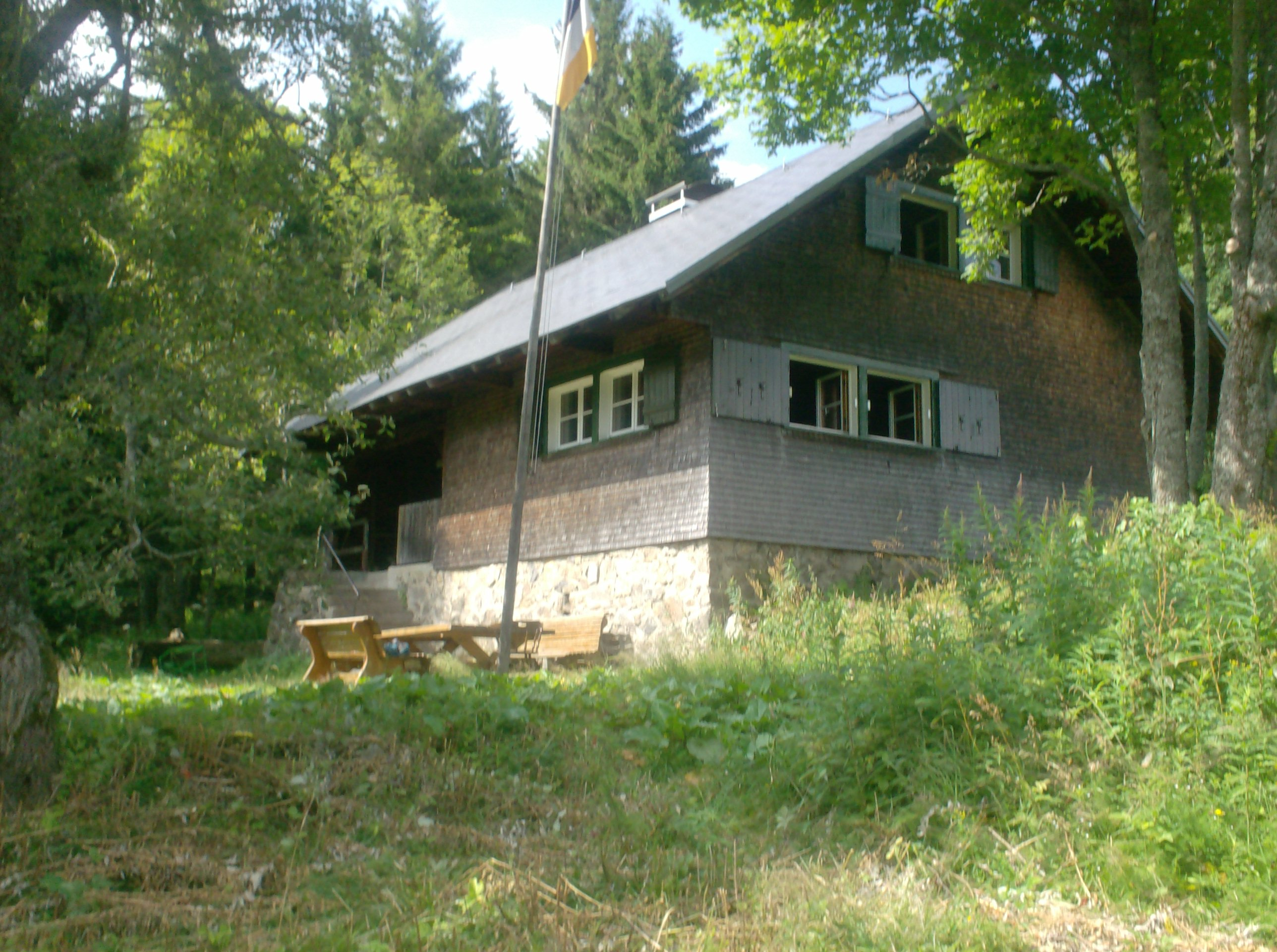 Berghütte am Feldberg